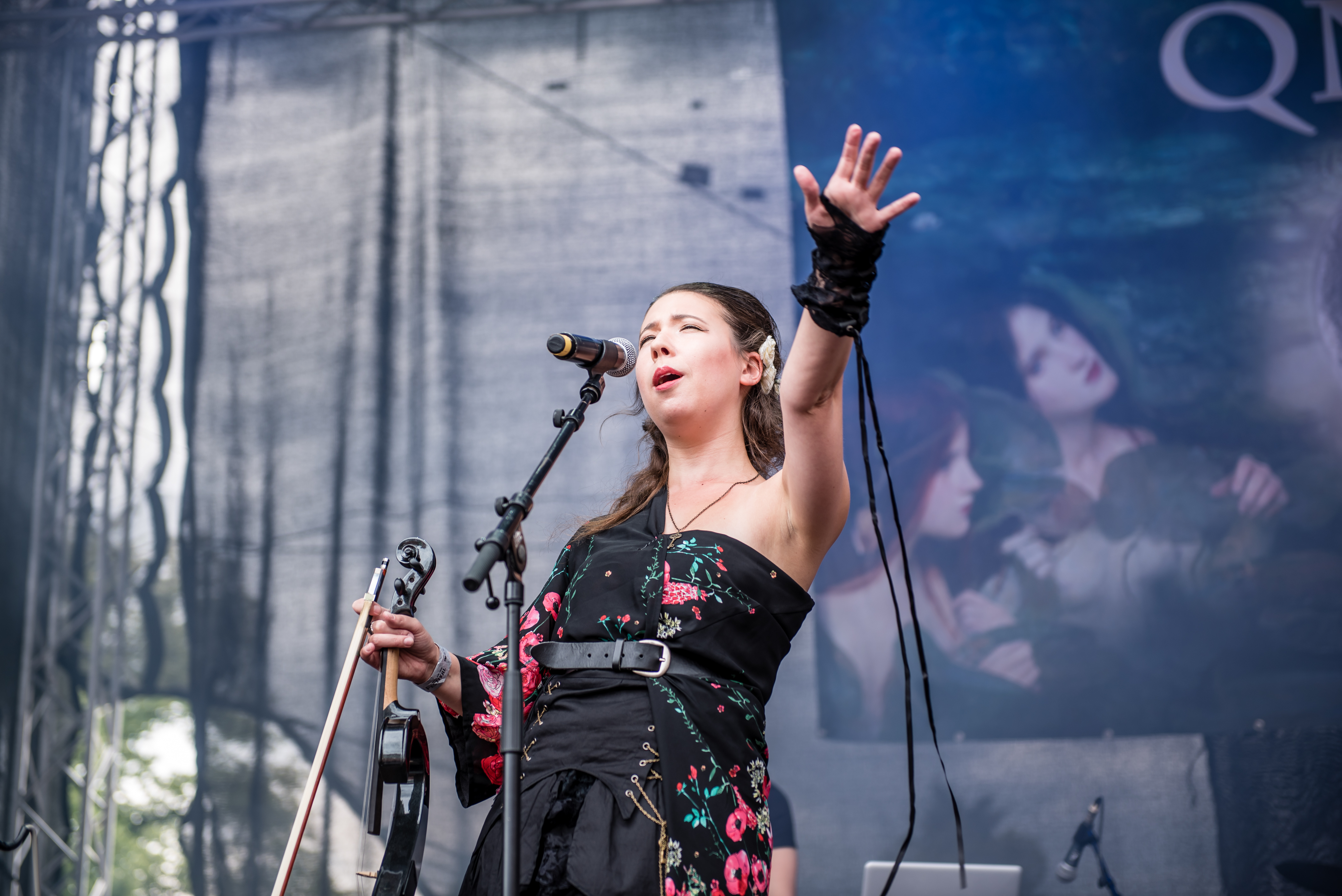 'Amphi Festival 2015; Köln - Lanxess Arena': 'Qntal'